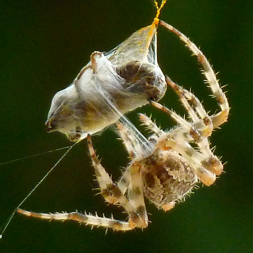 Eine Kreuzspinne umwickelt ihre Beute mit einem Sekretband aus ihren Spinndrüsen